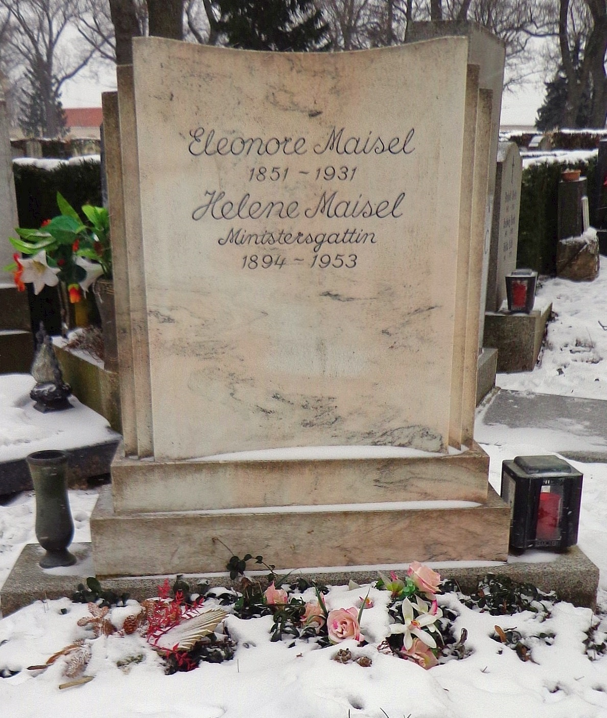 Feuerhalle Simmering - Urnenhain, Urnengrab von Helene Maisel, der Ehefrau des Gewerkschafters und SPÖ-Politikers Karl Maisel (Abteilung 3, Ring 3, Gruppe 8, Nummer 1).